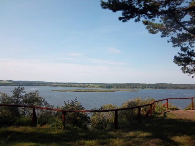 Kauno marios nuo Mergakalnio regyklos, Dovainonys, Kaišiadorių r.